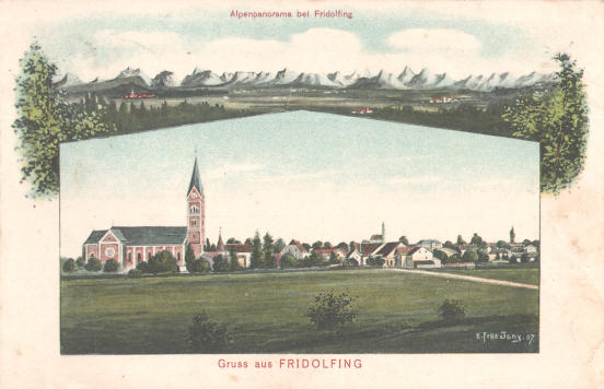 Fridolfing